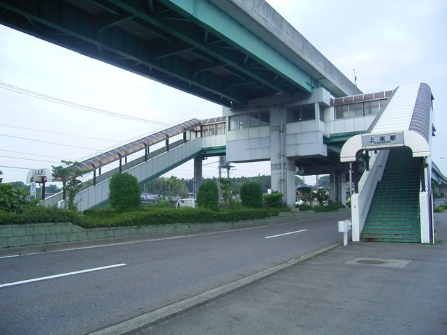 2005年5月に、投稿者が撮影。桃花台新交通桃花台線の上末駅の全体写真。